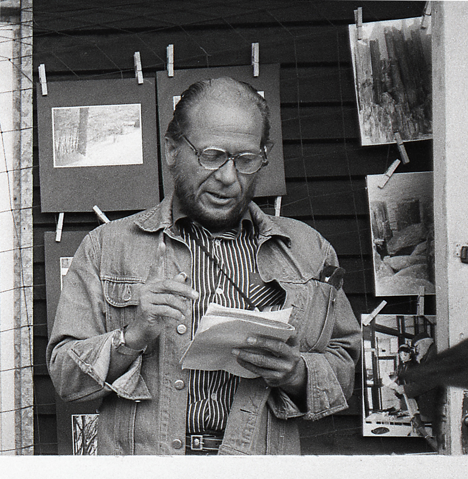 Peeter Tooming, fotograaf ja filmioperaator 87